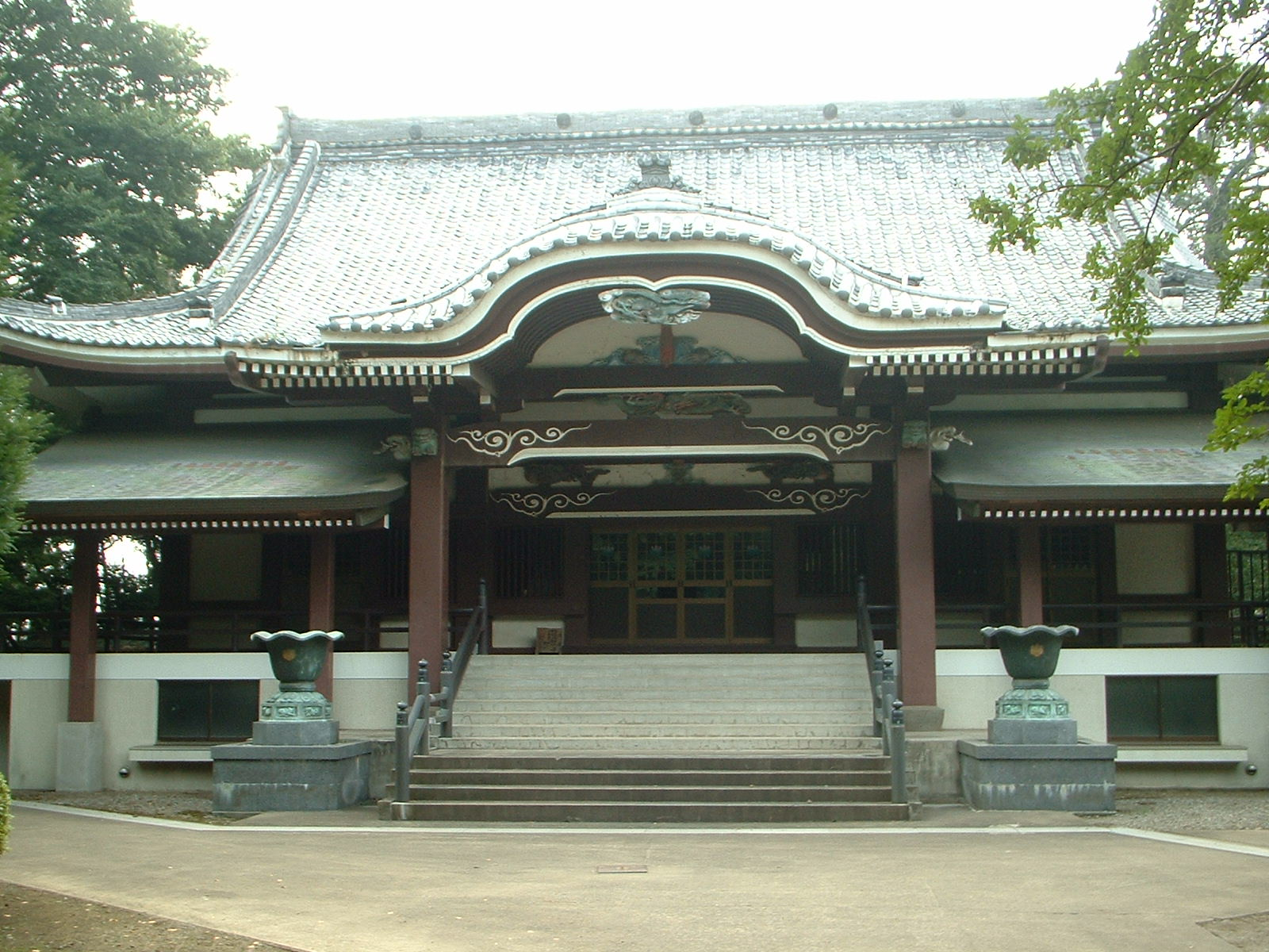 明星院：桶川の倉田にある寺院